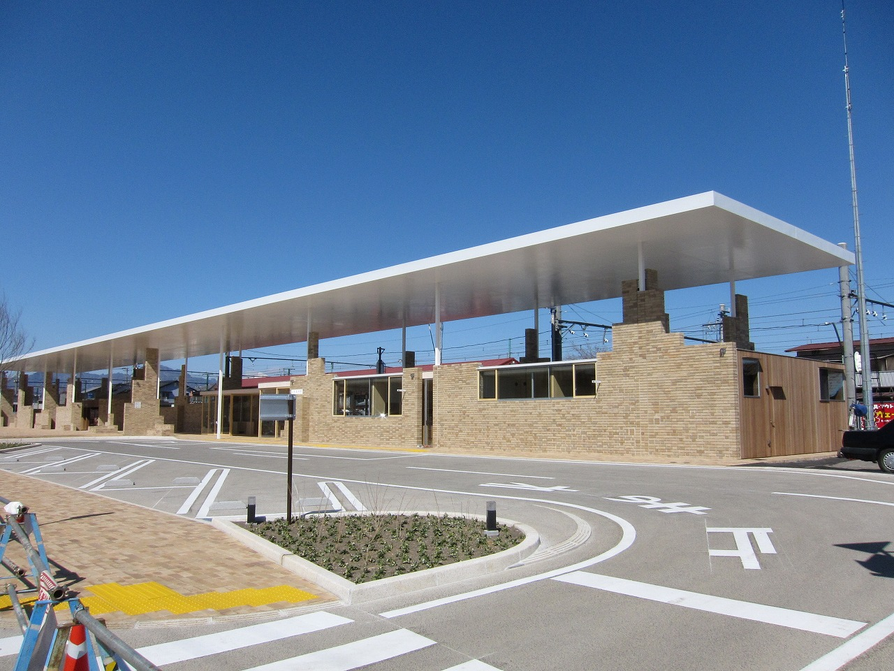 上信電鉄上州富岡駅3代目駅舎